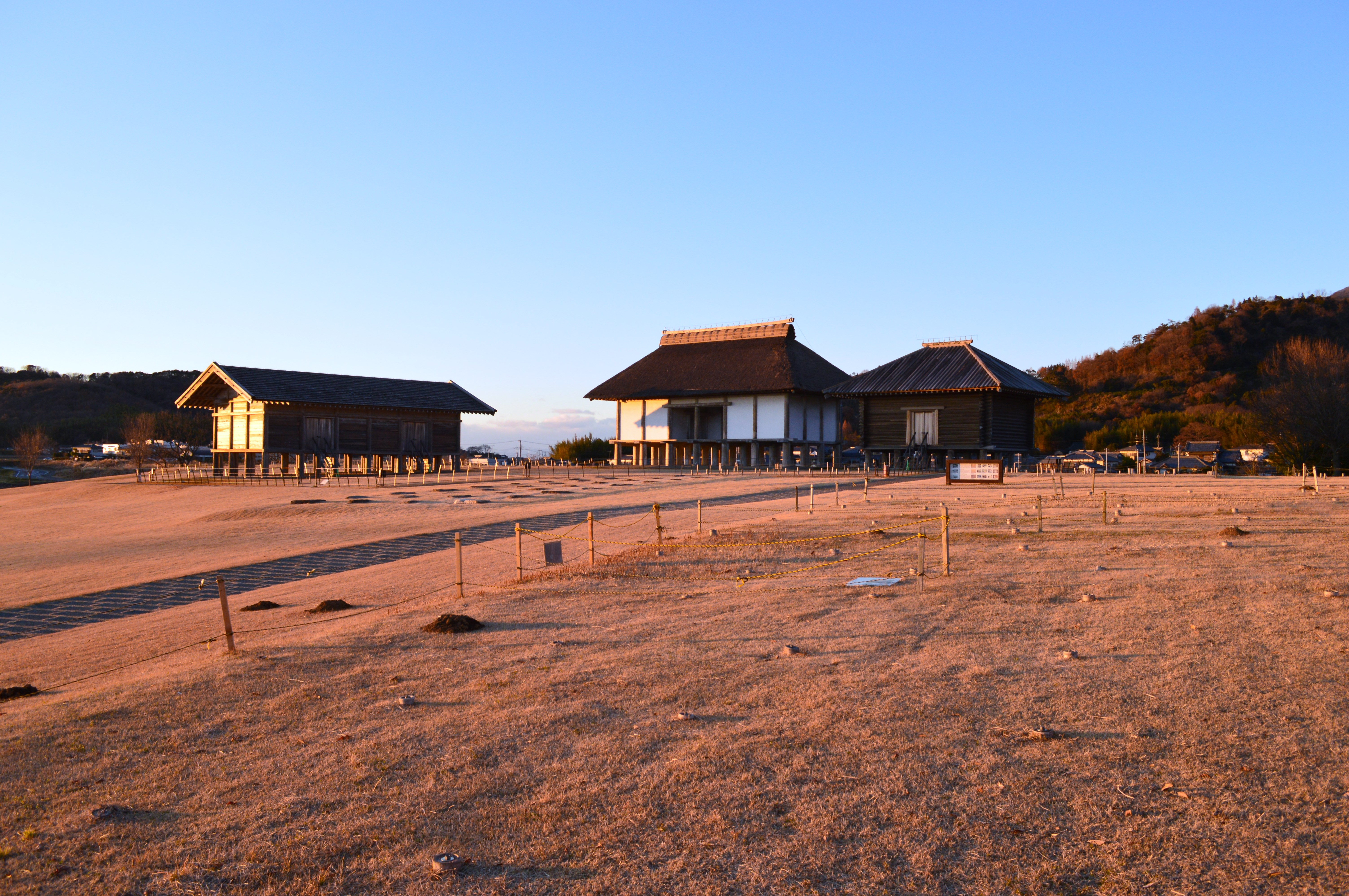 平沢官衙遺跡 全景